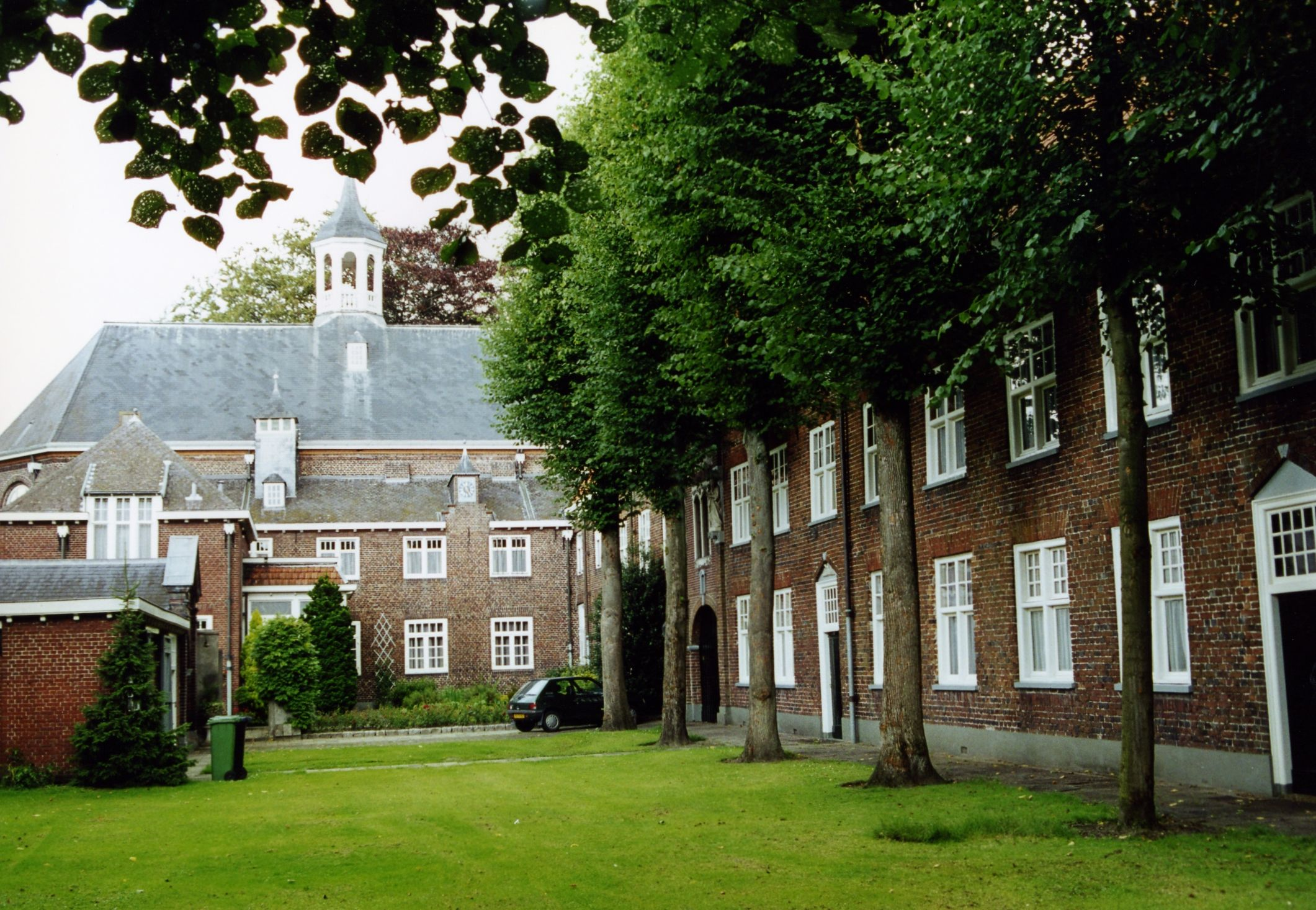 Birgittinessenklooster "Maria Refugie", waarin een deel van het kasteel Vorstenburgh is opgenomen.